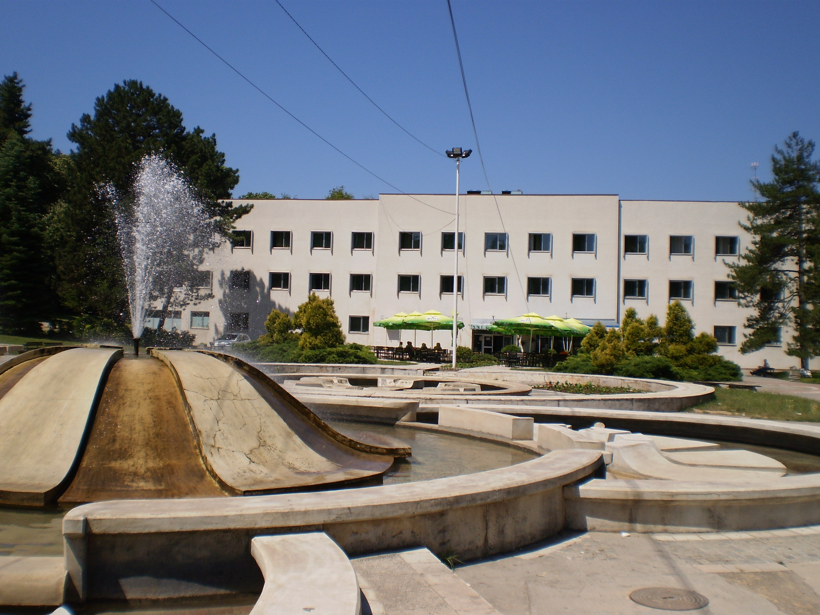 Hotel „Zelengora“ u Niškoj Banji. Autor dr Milorad Dimić, Niš, Srbija, 17. jun 2012.